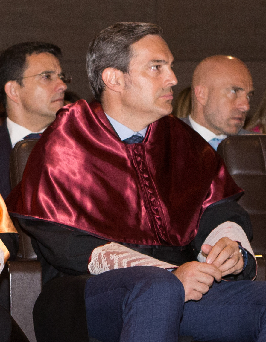 Doctorado en ingeniería industrial y management por la Escuela Politécnica Federal de Zúrich.